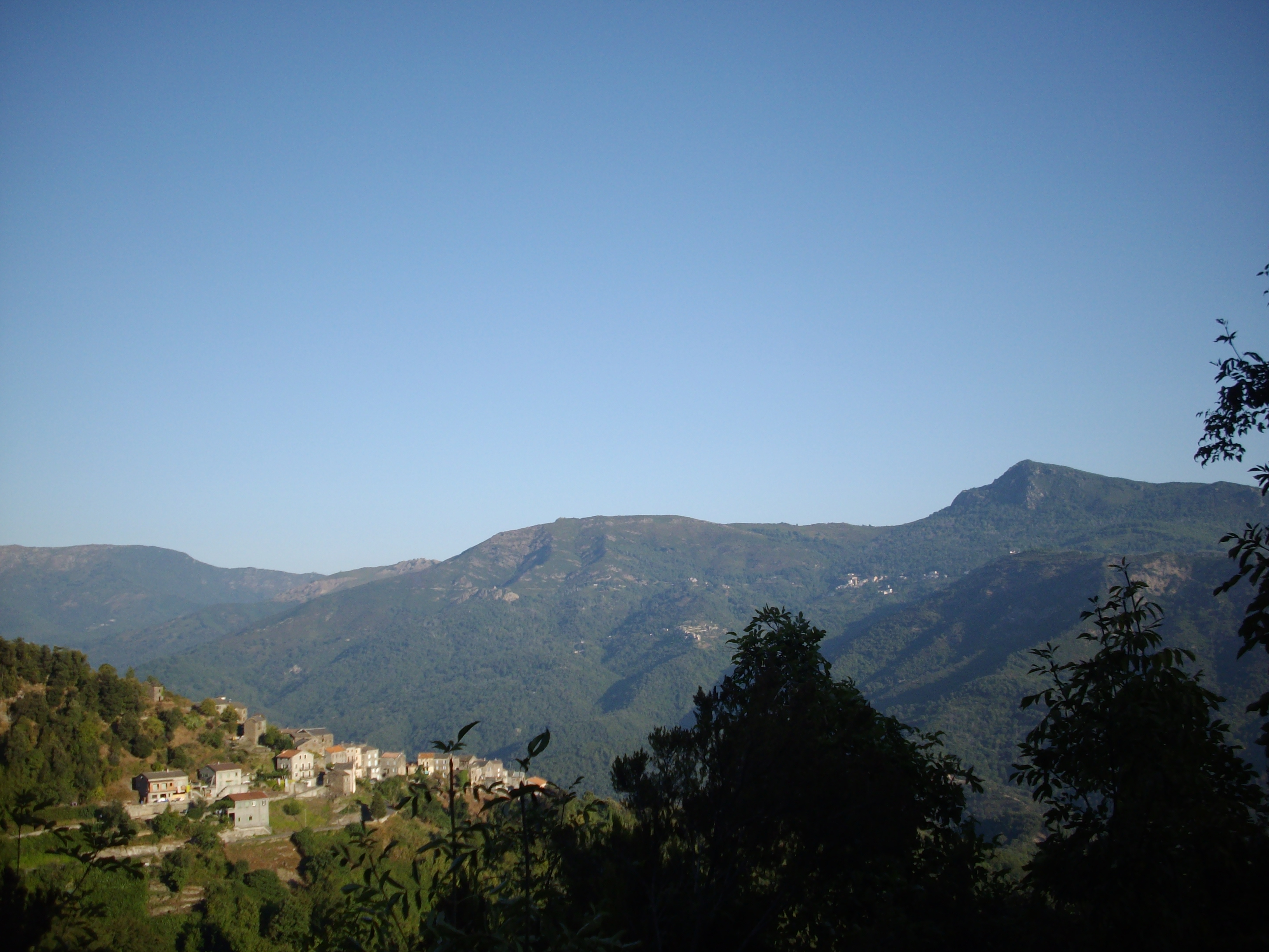 Pruno devant le fin fond de la Castagniccia, pris depuis les crêtes du Mont Taglio.